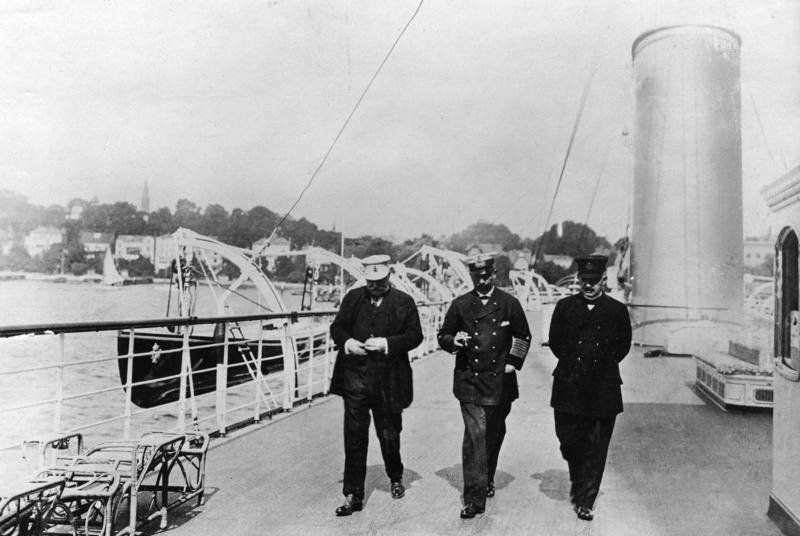 Kaiser Wilhelm II., von Bülow und Valentini Zentralbild Bernhard Fürst von Bülow, deutscher Staatsmann, geb.3.5.1849 in Klein-Flottbeck bei Altona, gest.28.10.1929 in Rom; Diplomat, Reichskanzler und preußischer Ministerpräsident. UBz.: Politischer Vortrag bei Wilhelm II., Kaiser von Deutschland, König von Preußen, an Bord der "Hohenzollern" in Kiel im Jahre 1908. Von links: der Reichskanzler und preußische Ministerpräsident Bernhard Fürst von Bülow, Kaiser Wilhelm II., der Chef des Geheimen Zivilkabinetts des Kaisers Rudolf von Valentini. Abgebildete Personen: Bülow, Bernhard von Fürst: Reichskanzler, Ministerpräsident, Diplomat, Preußen, Deutschland Wilhelm II.: Deutsches Reich, Kaiser, II., Deutschland Valentini, Rudolf von: Politiker